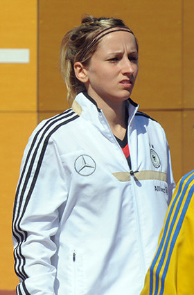 a_41_7323